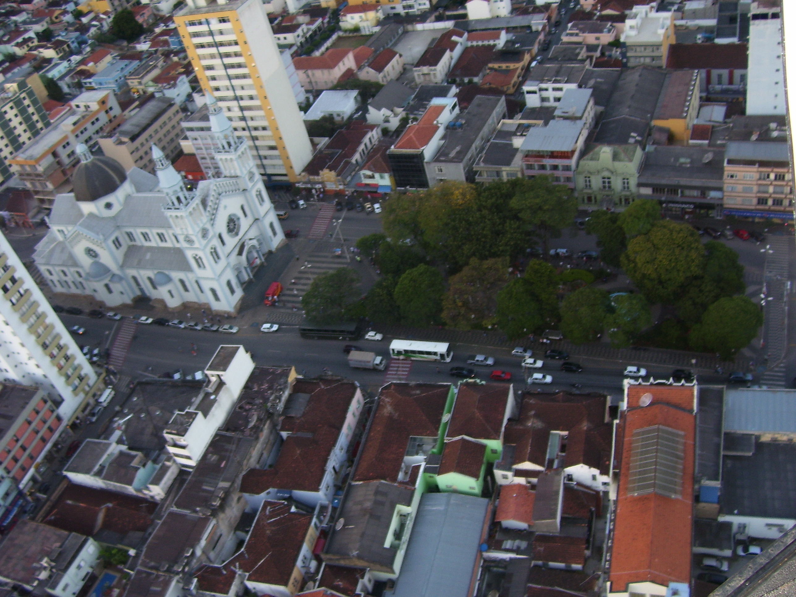 foto_pouso-alegre_minas_gerais_brazil